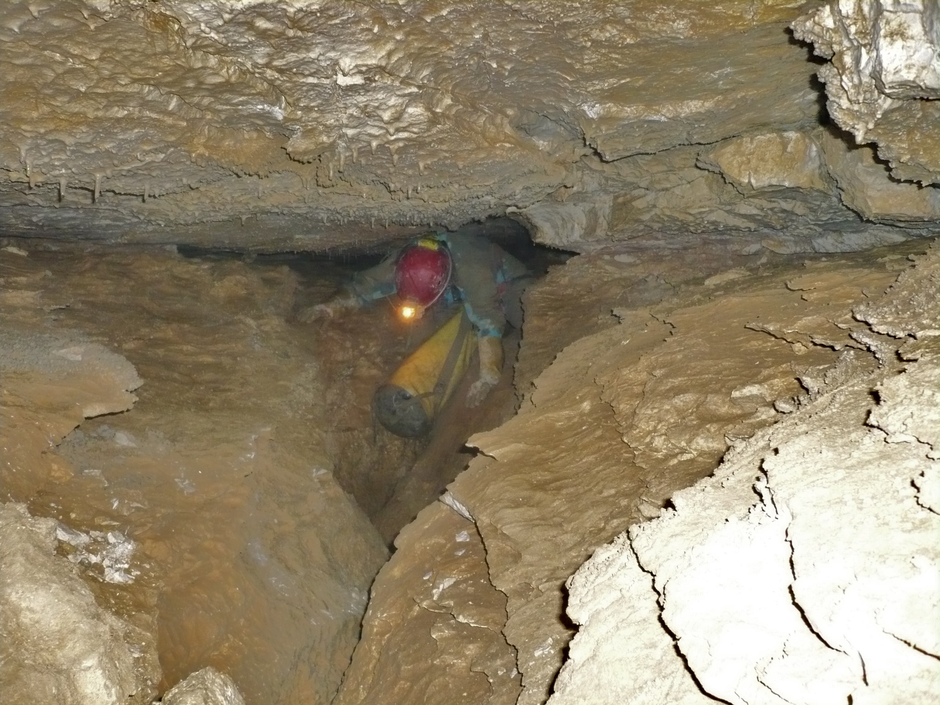 Nous pouvons remarquer le joint de strate horizontale à l'origine de la galerie.